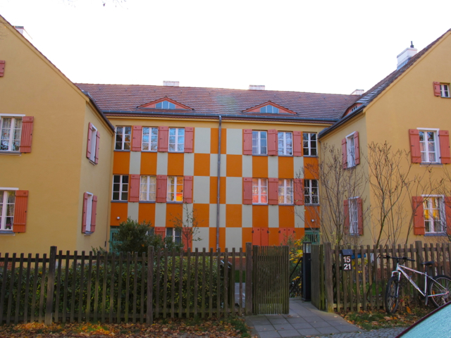 Gartenstadt Falkenberg "Tuschkastensiedlung" Oktober 2012